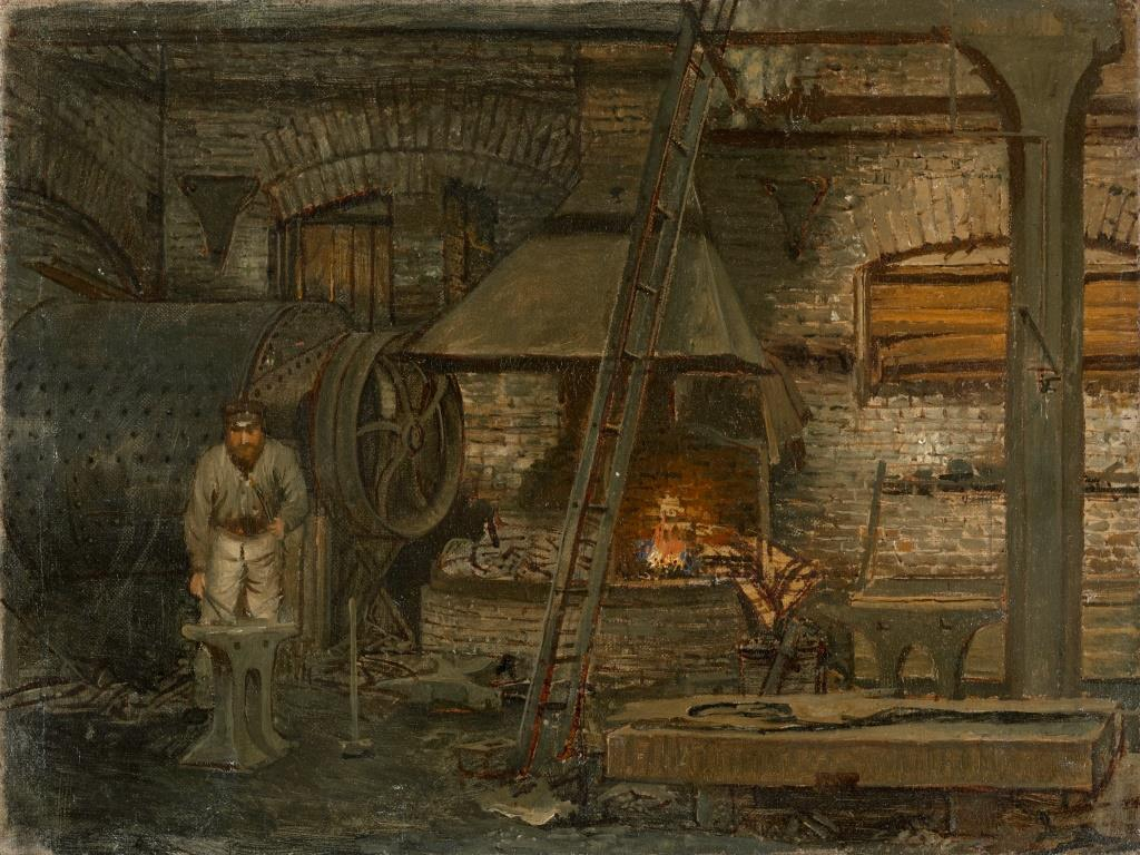 Алексей Корзухин. Кузница. Этюд. 1877. Холст, масло. ЕМИИ